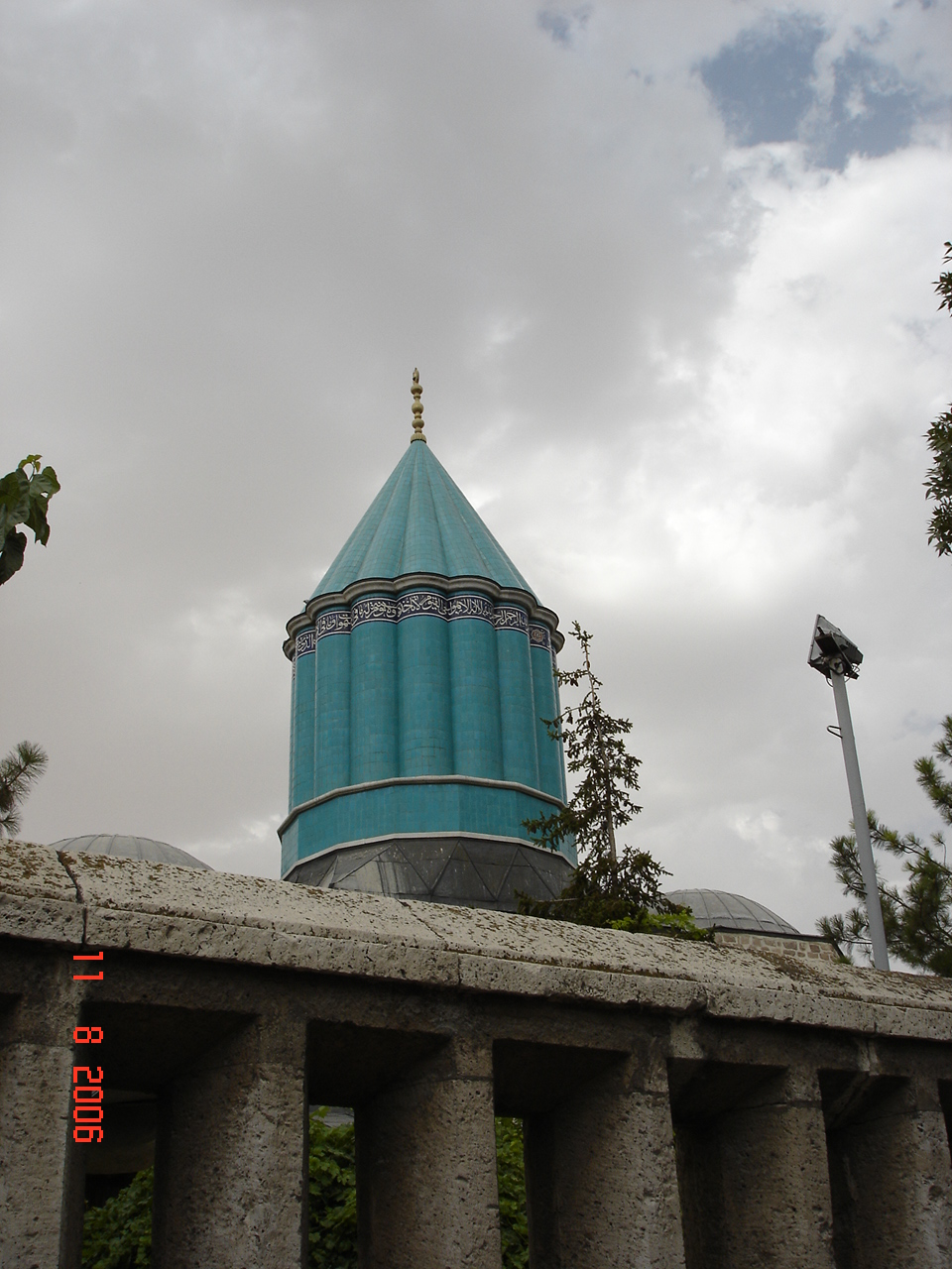 Yeşil Türbe "Green Tomb", Konya, Turkey